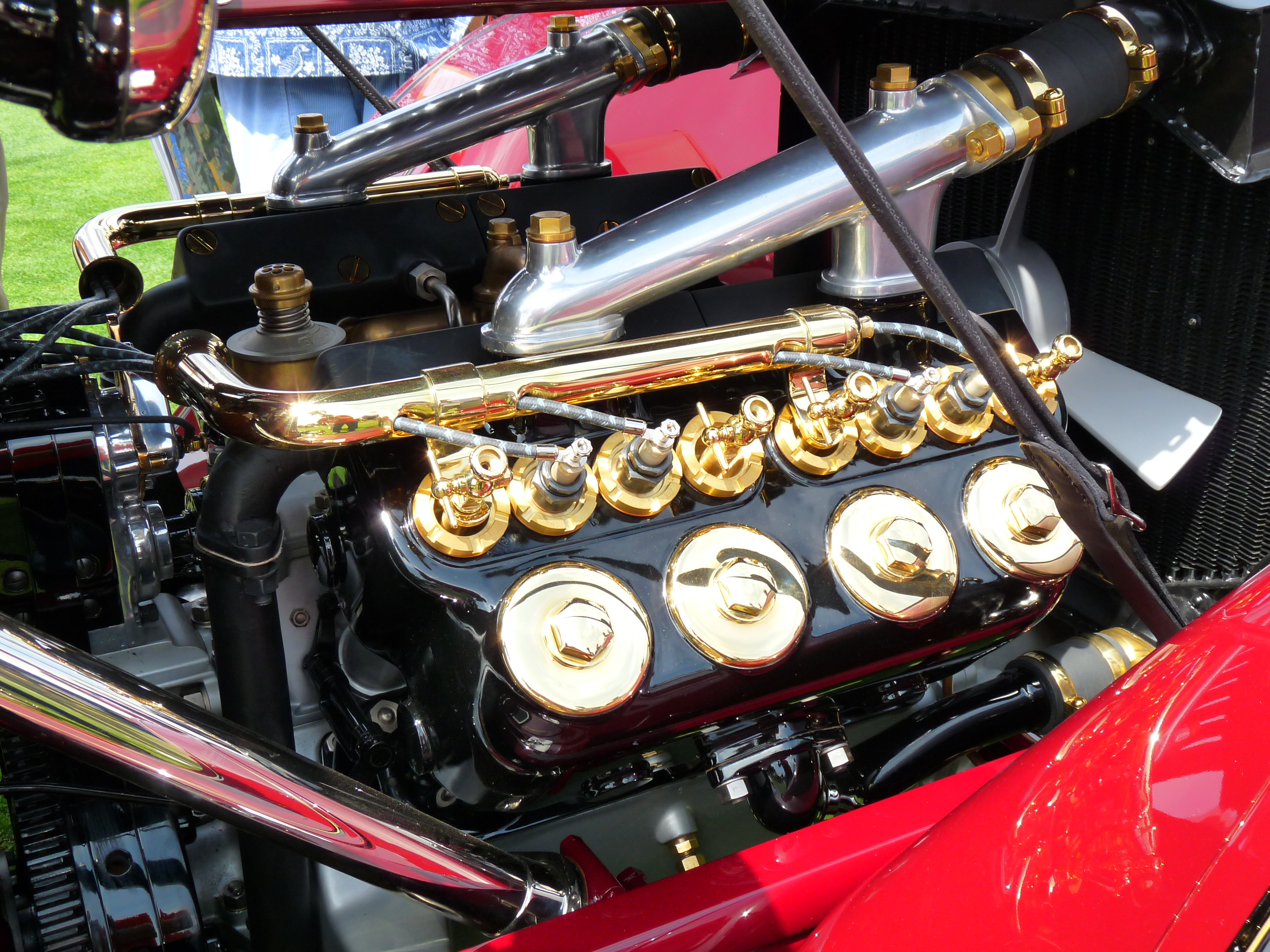 1912 De Dion Bouton DM A.S. Flandrau Roadster